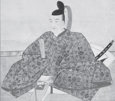 近江仁正寺藩8代藩主・市橋長璉の肖像画。